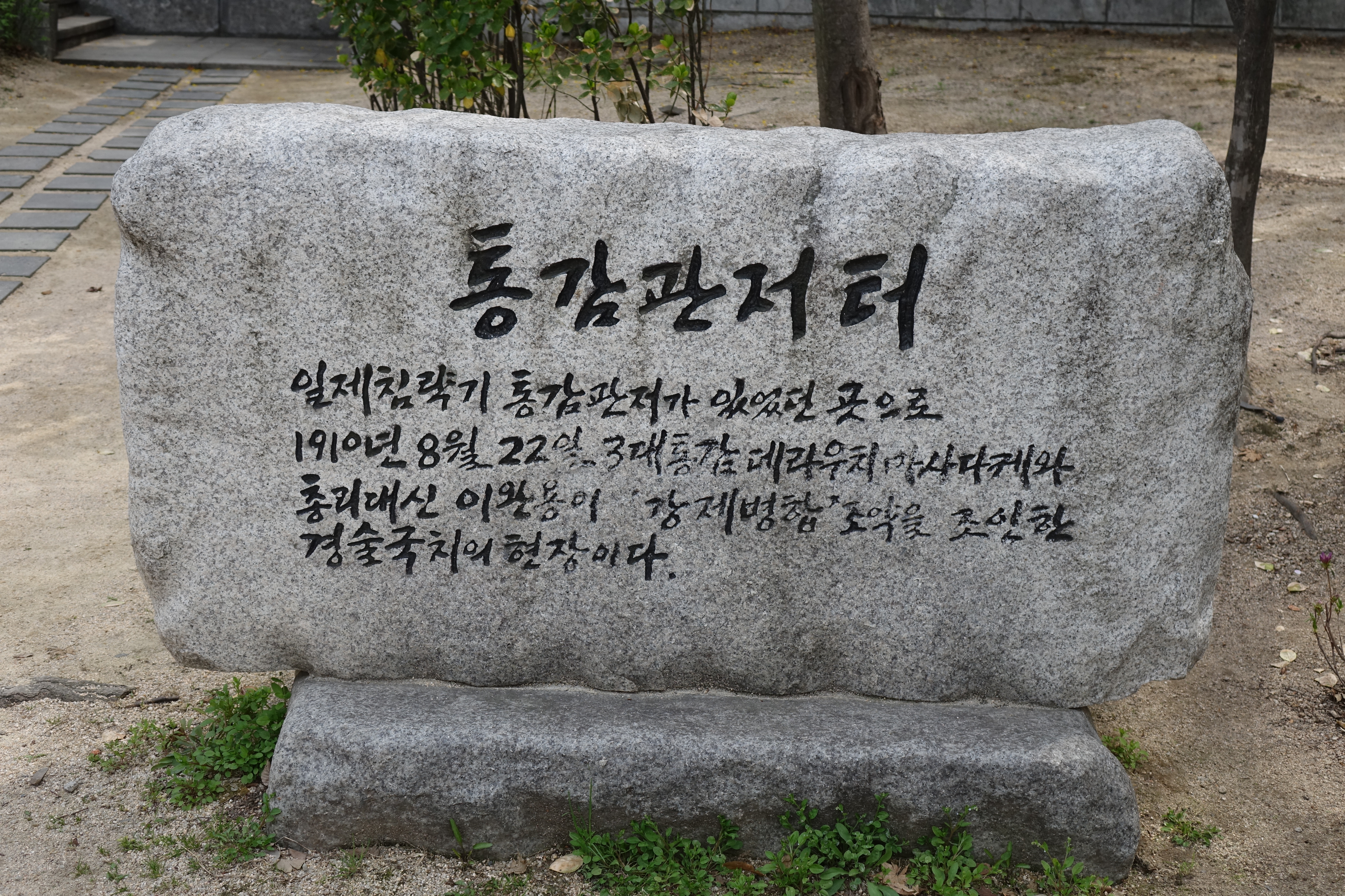 서울특별시 중구 통감관저터 표석. 2015년 4월 27일. 최광모.